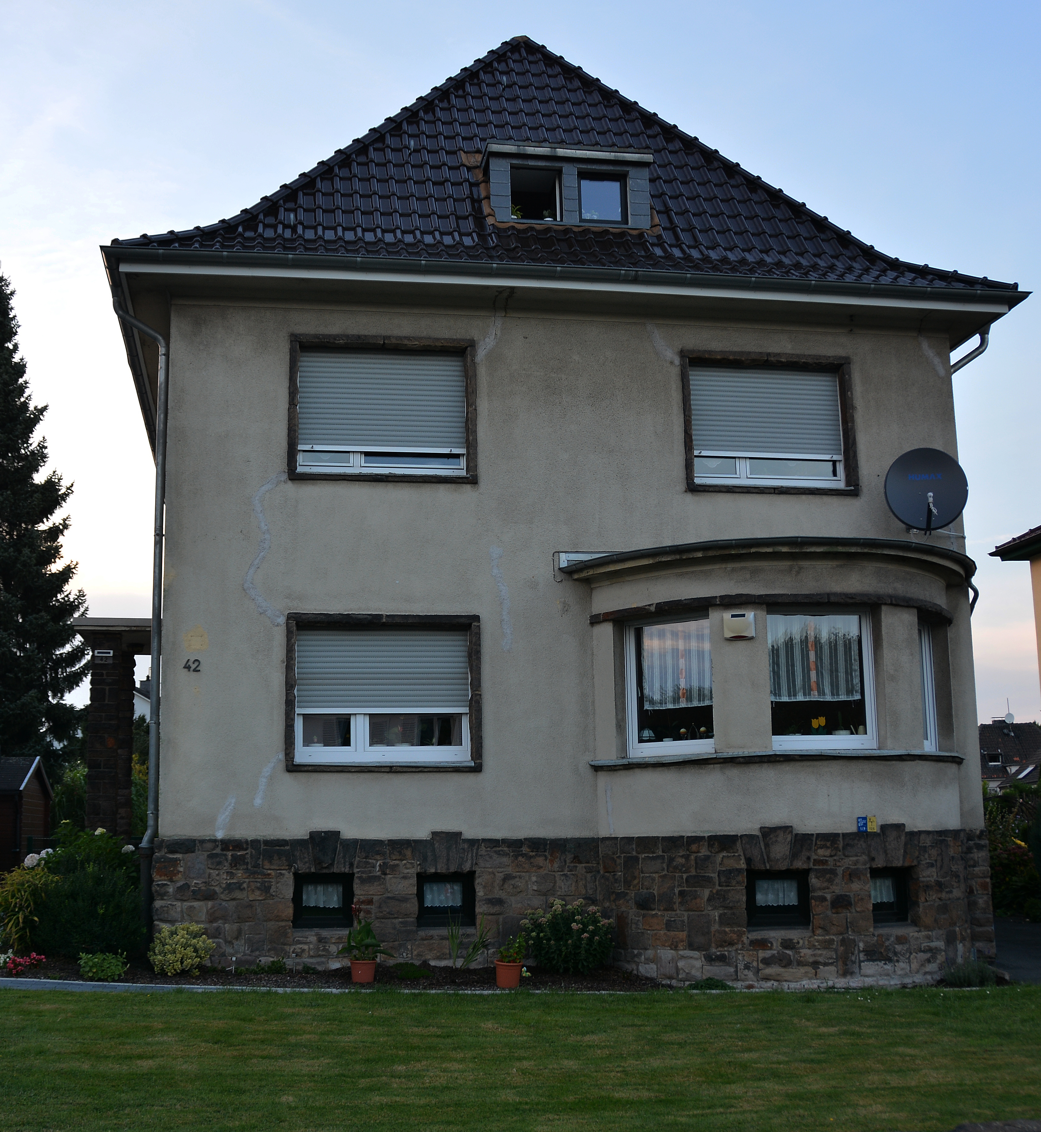 Wohnhaus eines Opfers des Naziterrors